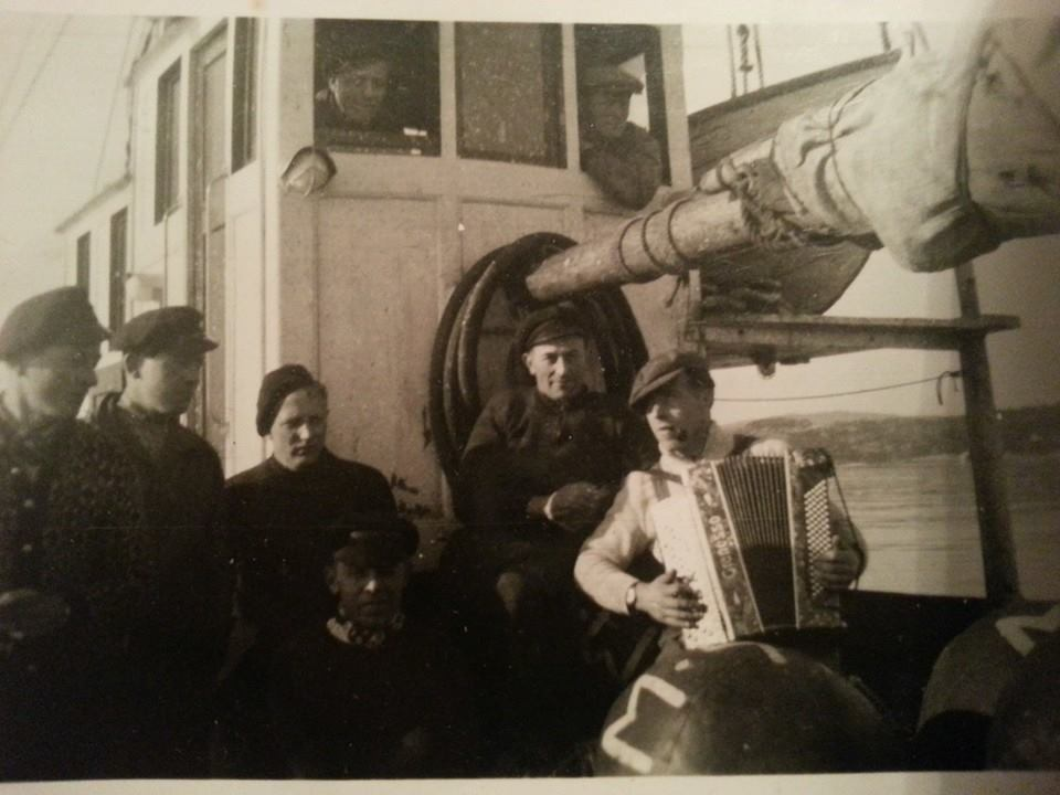 Haram_MK_JOSTEIN_M_47_H